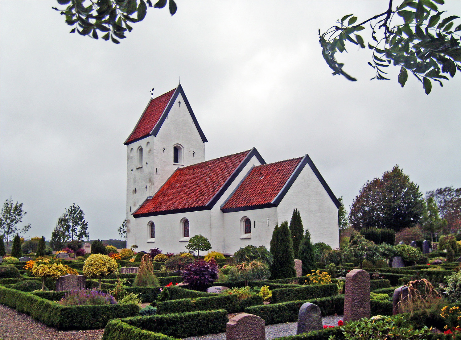 fra sydøst